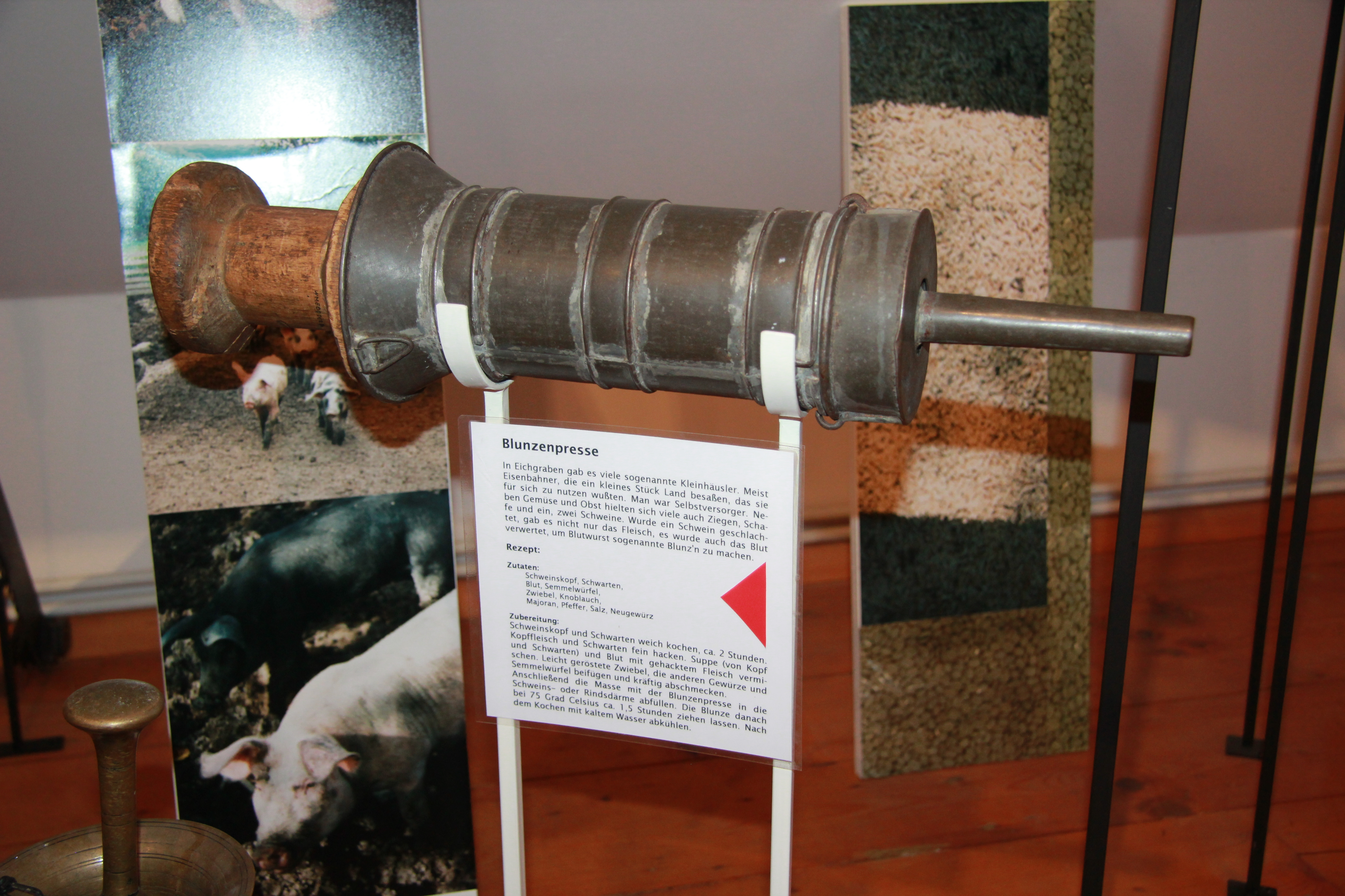 Ausstellungsstücke des Wienerwaldmuseums, Eichgraben, Niederösterreich